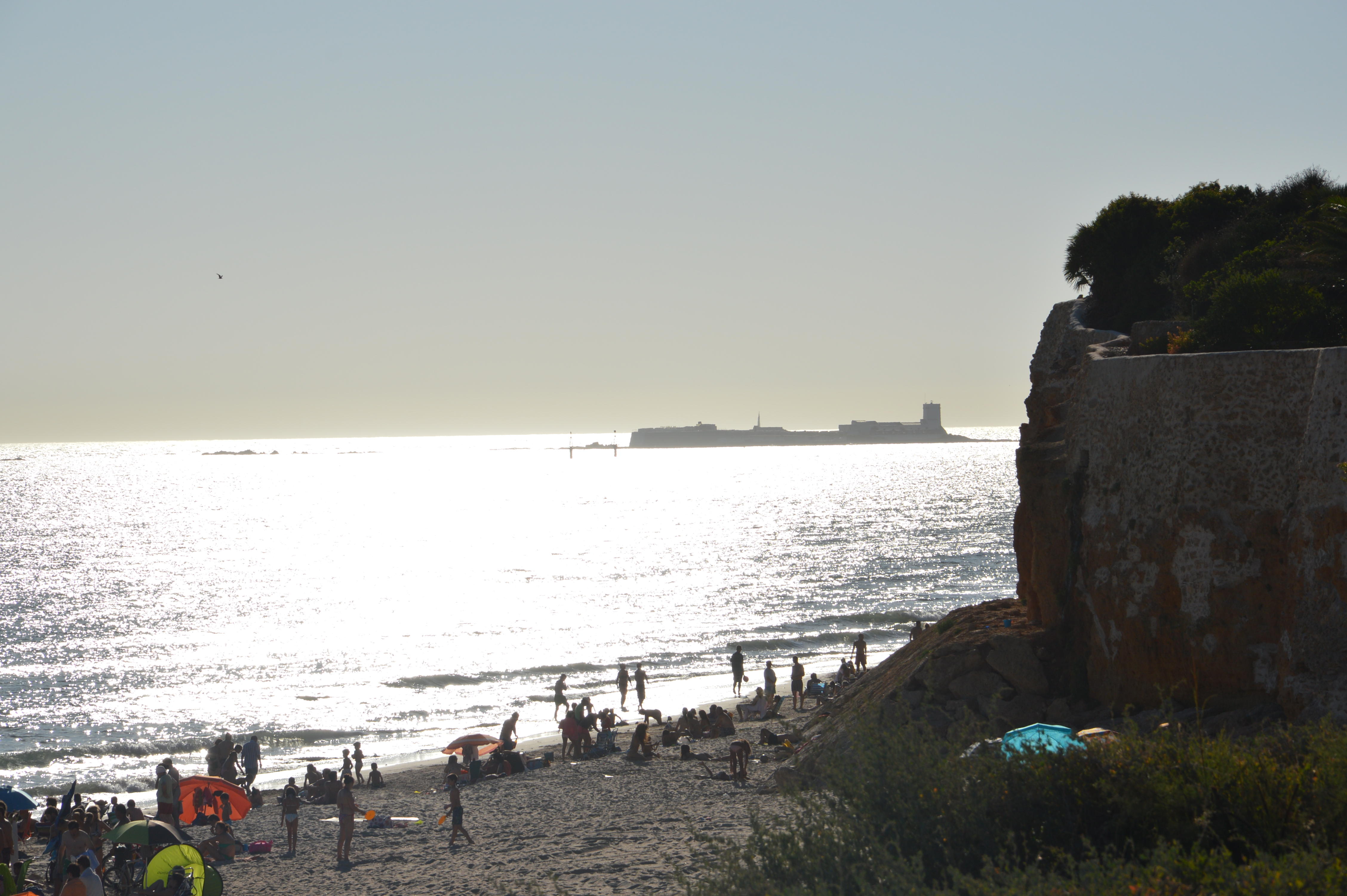 Vista panorámica de la Playa de La Barrosa en Chiclana de la Frontera, Cádiz, Andalucía, España, en 2013